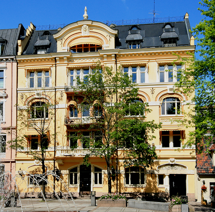 Bankplassen 1a, Oslo. Built 1896. Architect: Ole Stein.